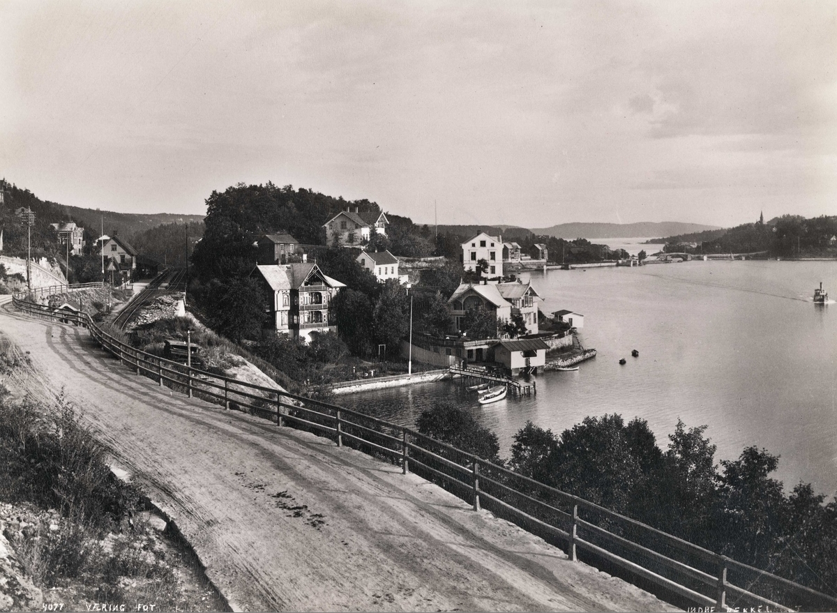 Bekkelagskollen fotografert fra nord, ca. 1905. Husene hadde adresse Kolleveien.